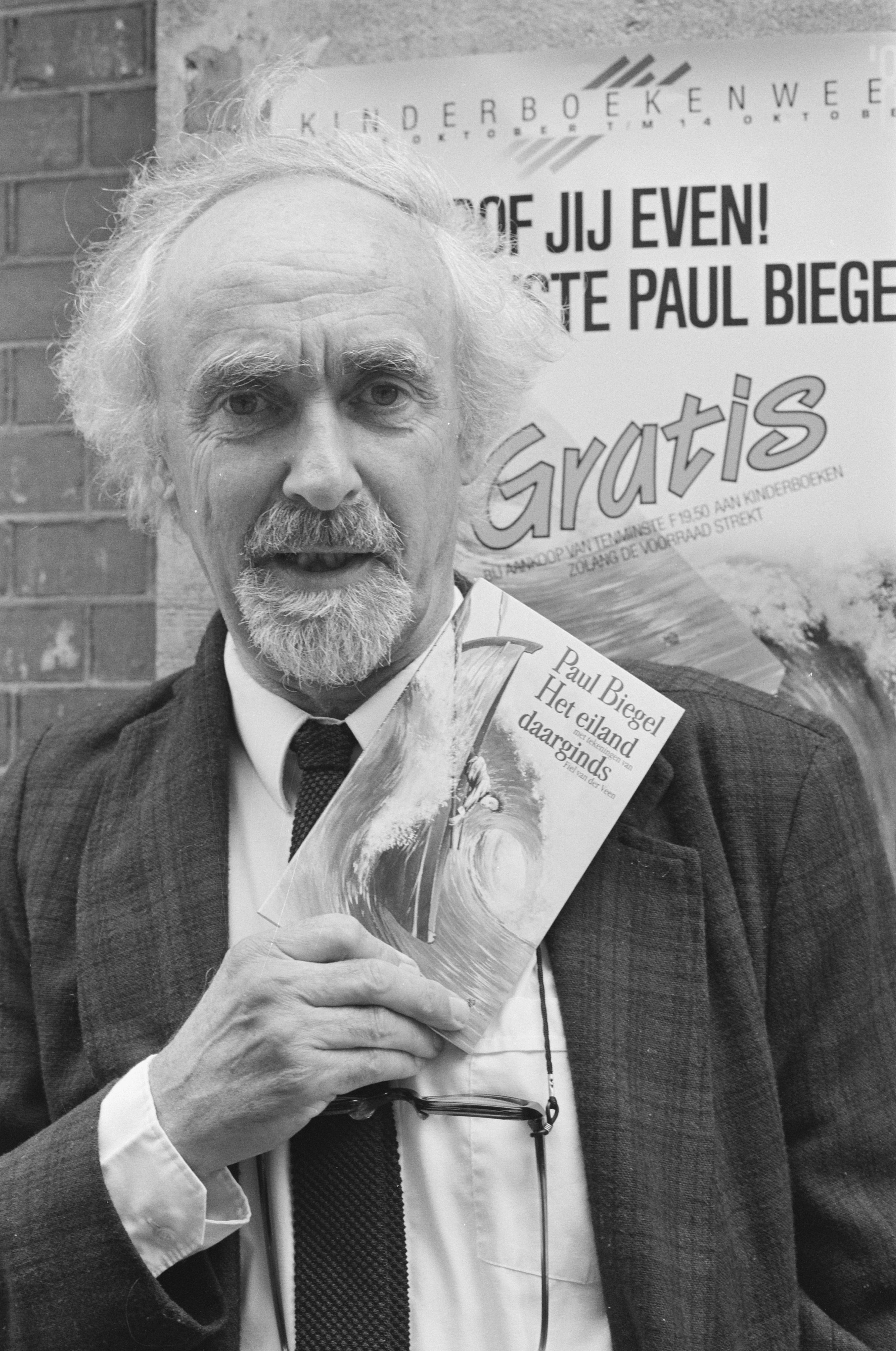 Collectie / Archief : Fotocollectie Anefo Reportage / Serie : [ onbekend ] Beschrijving : Schrijver Paul Biegel met het kinderboekenweekgeschenk Datum : 11 september 1989 Trefwoorden : geschenken, kinderboekenweek, schrijvers Persoonsnaam : Biegel, Paul Fotograaf : Croes, Rob C. / Anefo Auteursrechthebbende : Nationaal Archief Materiaalsoort : Negatief (zwart/wit) Nummer archiefinventaris : bekijk toegang 2.24.01.05 Bestanddeelnummer : 934-4982